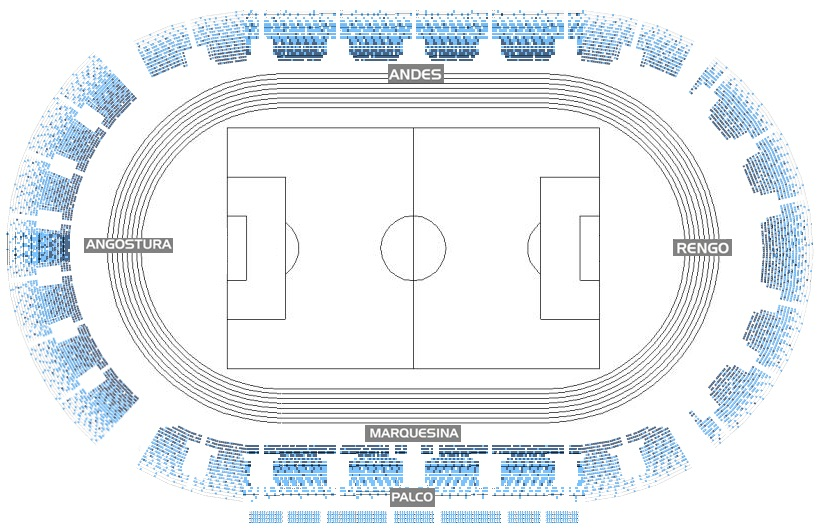 Map of the Estadio El Teniente